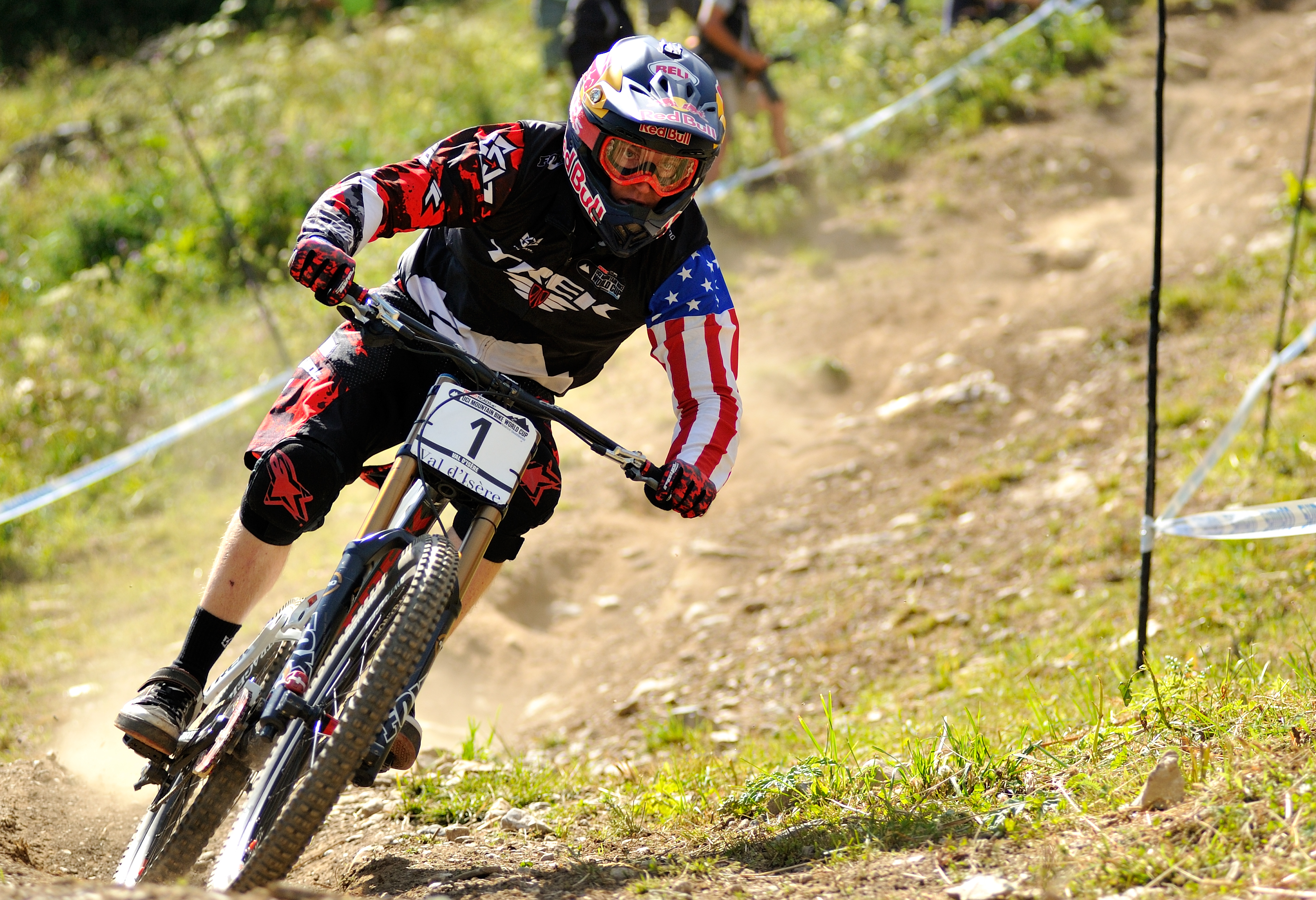 Aaron Gwin racing on his Downhill Mountain Bike at World Cup 6th round in France